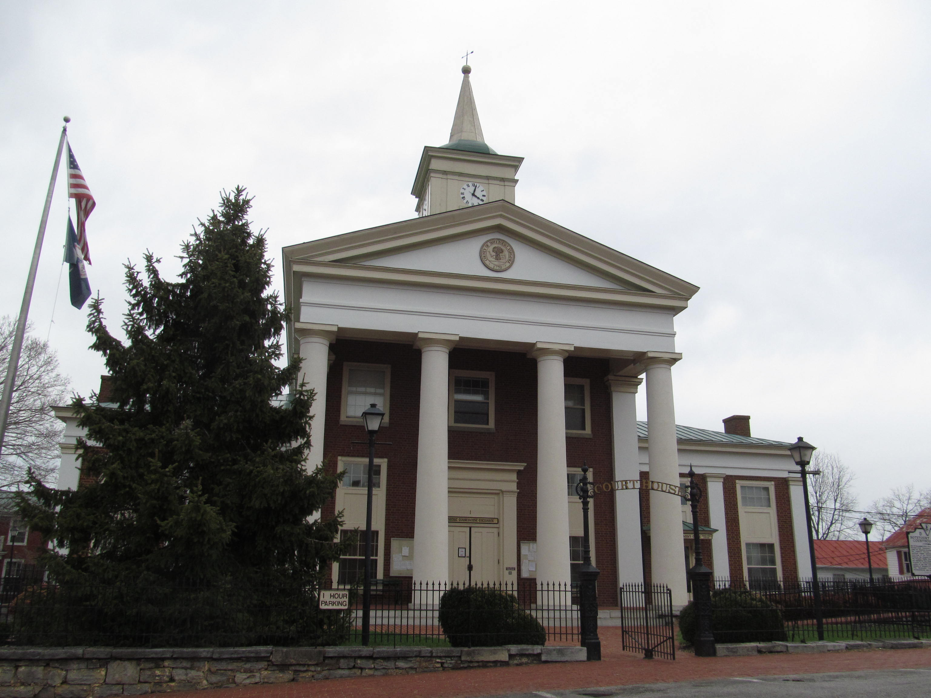 Fincastle, Virginia